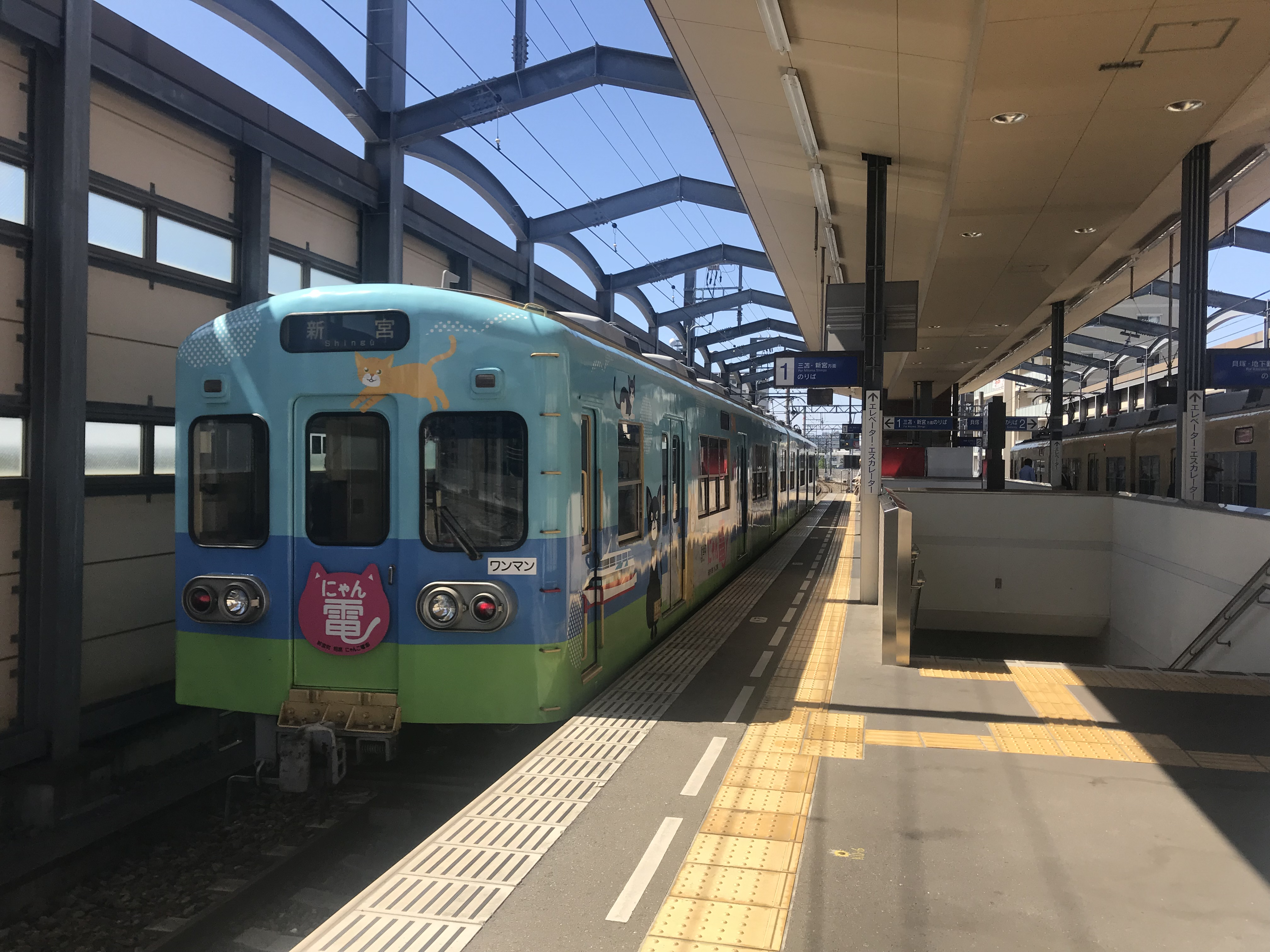 西鉄香椎駅のホームと西鉄新宮行き列車